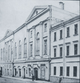 Центральный дом работников искусств (ЦДРИ), Москва